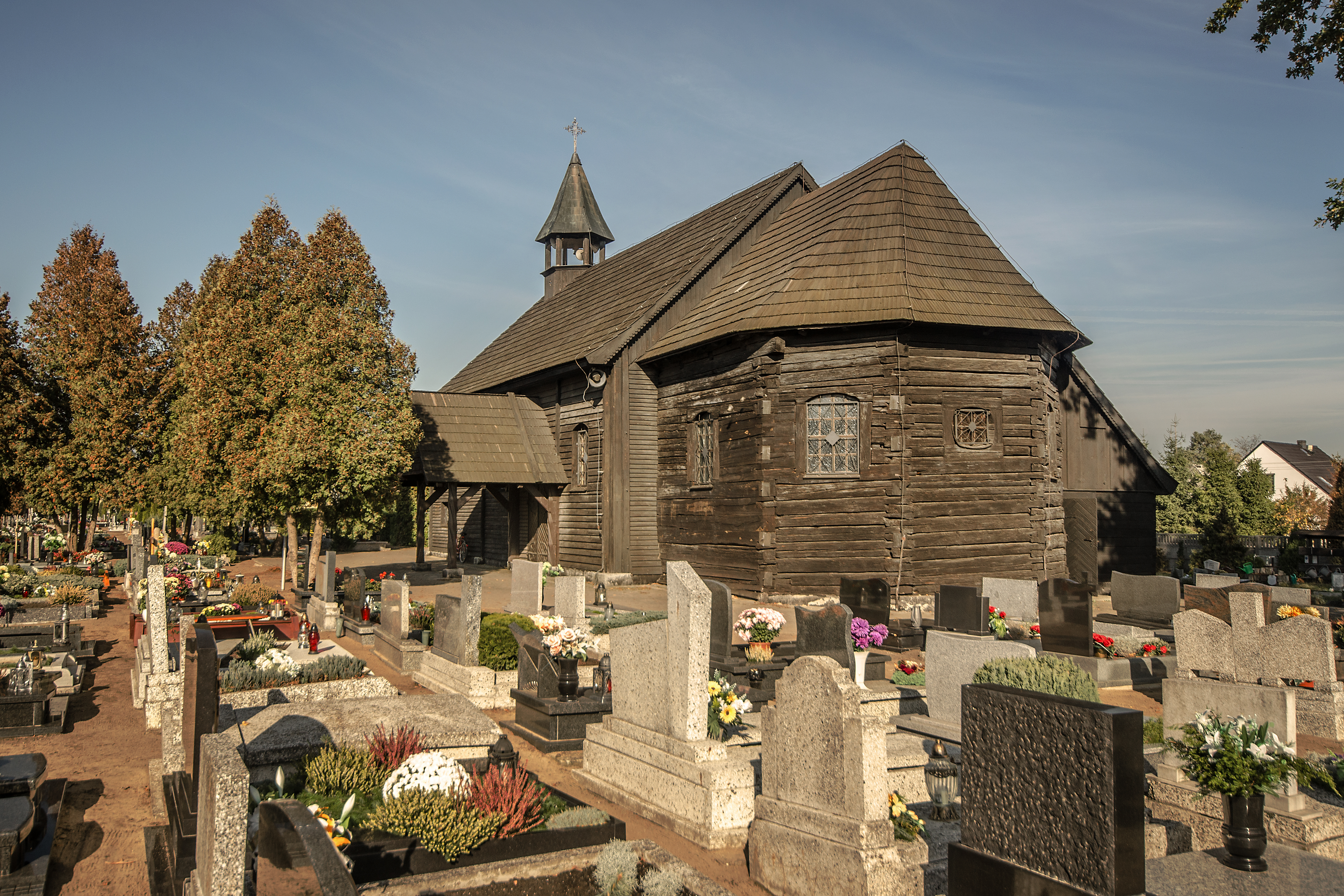 Popielów, kościół cmentarny p.w. Matki Boskiej i św. Andrzeja, 1654, 1889